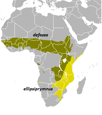 Γεωγραφική εξάπλωση της αντιλόπης του νερού με διακριτικά χρώματα για τις δύο ομάδες: των Κοινών (κίτρινο) και των Ντεφάσσα (πράσινο)